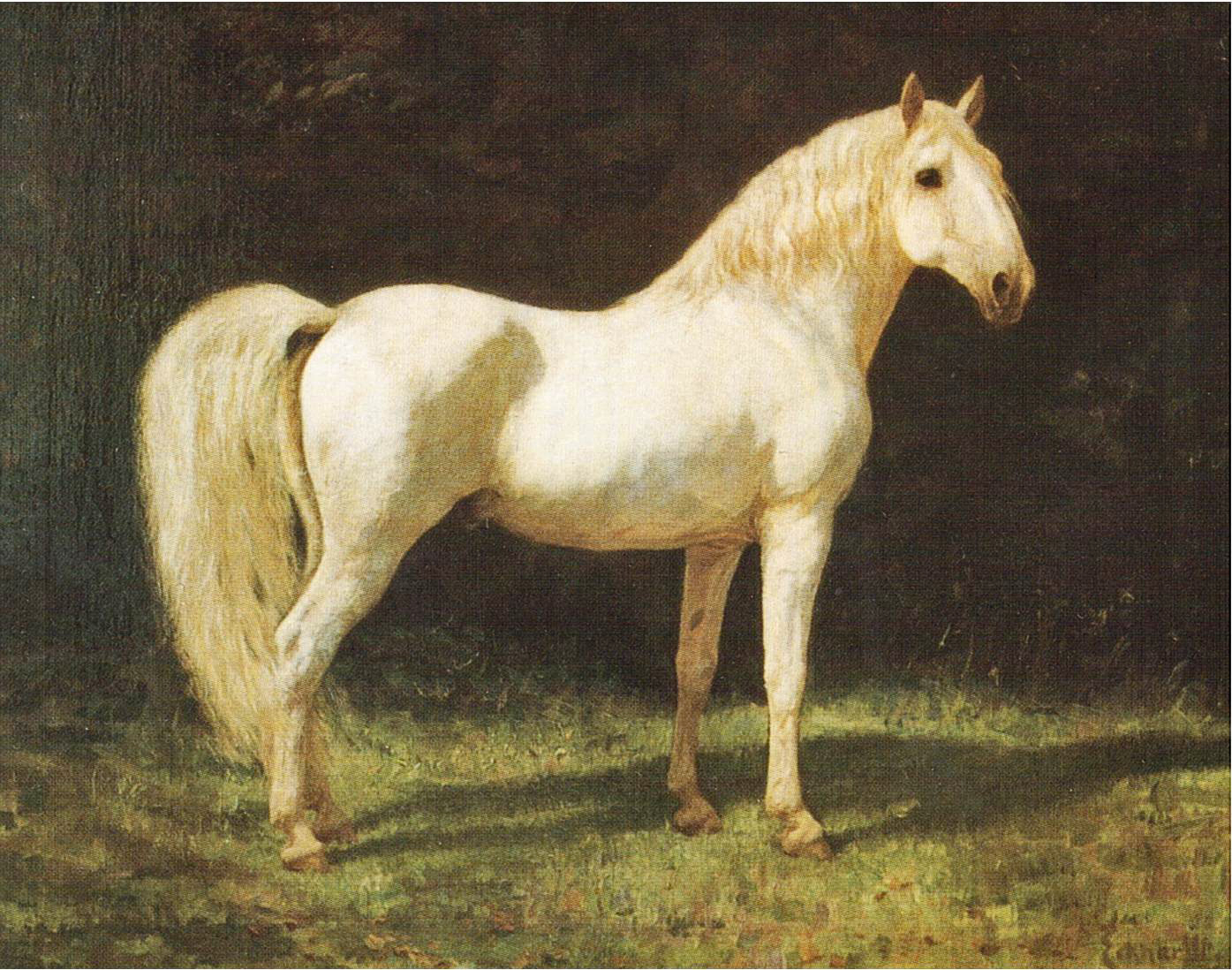 Kladruberhengst Generale Alba XIII, Sammlung Zámek Slatiňany, Hippologisches Museum, Tschechien